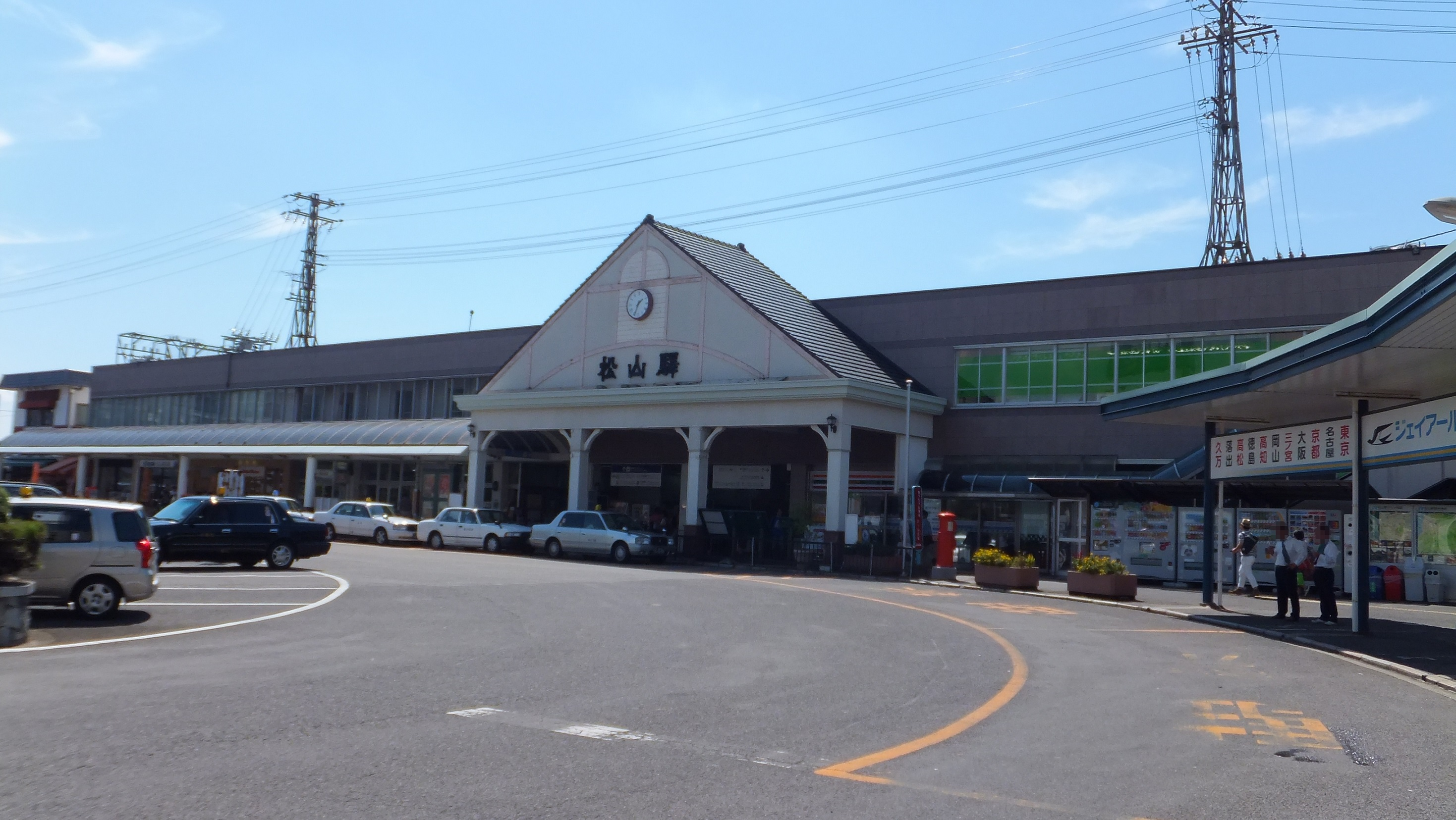 愛媛県松山市 JR松山駅 2015年9月